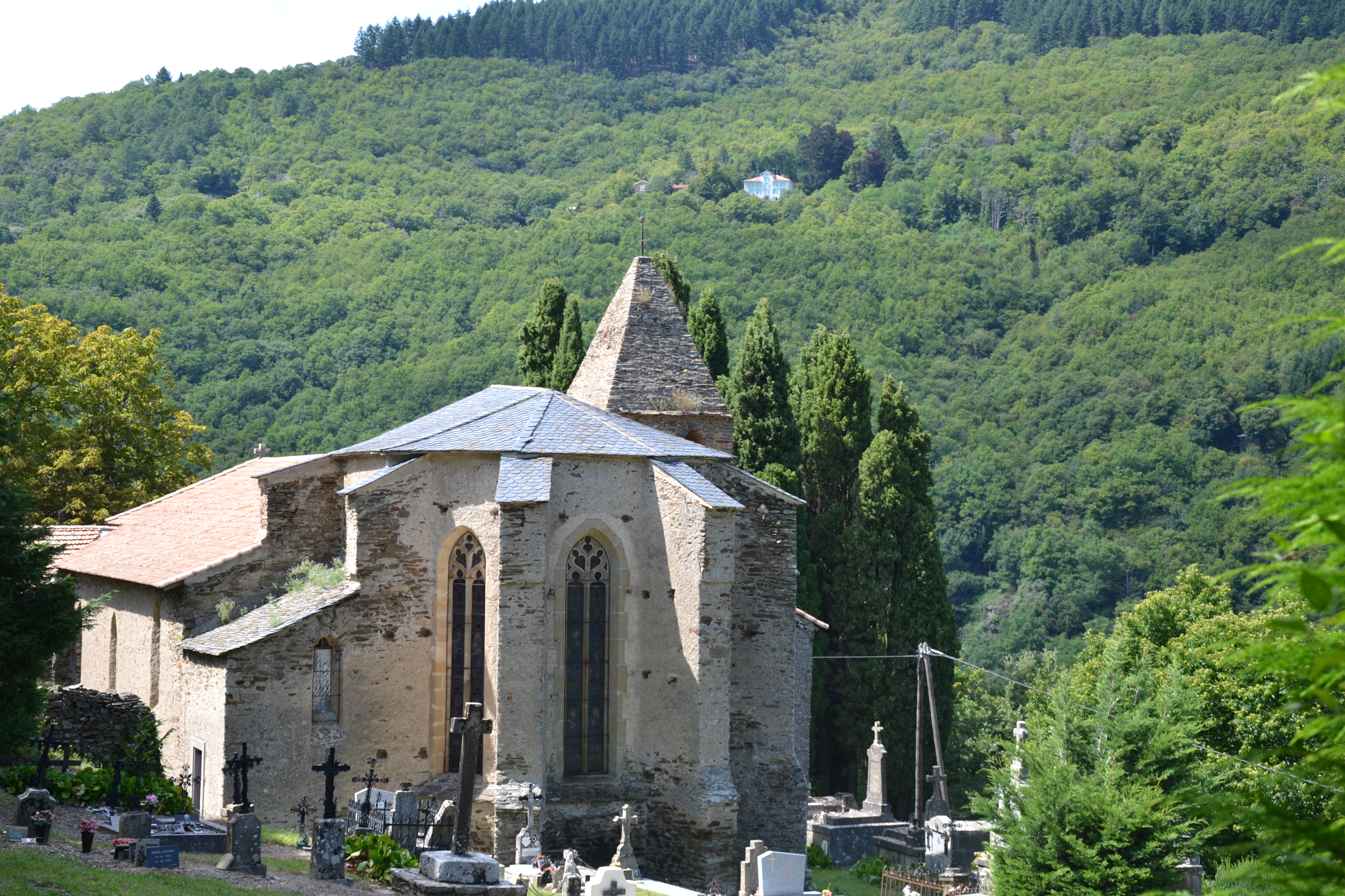 Eglise Saint-André - XIV siècle